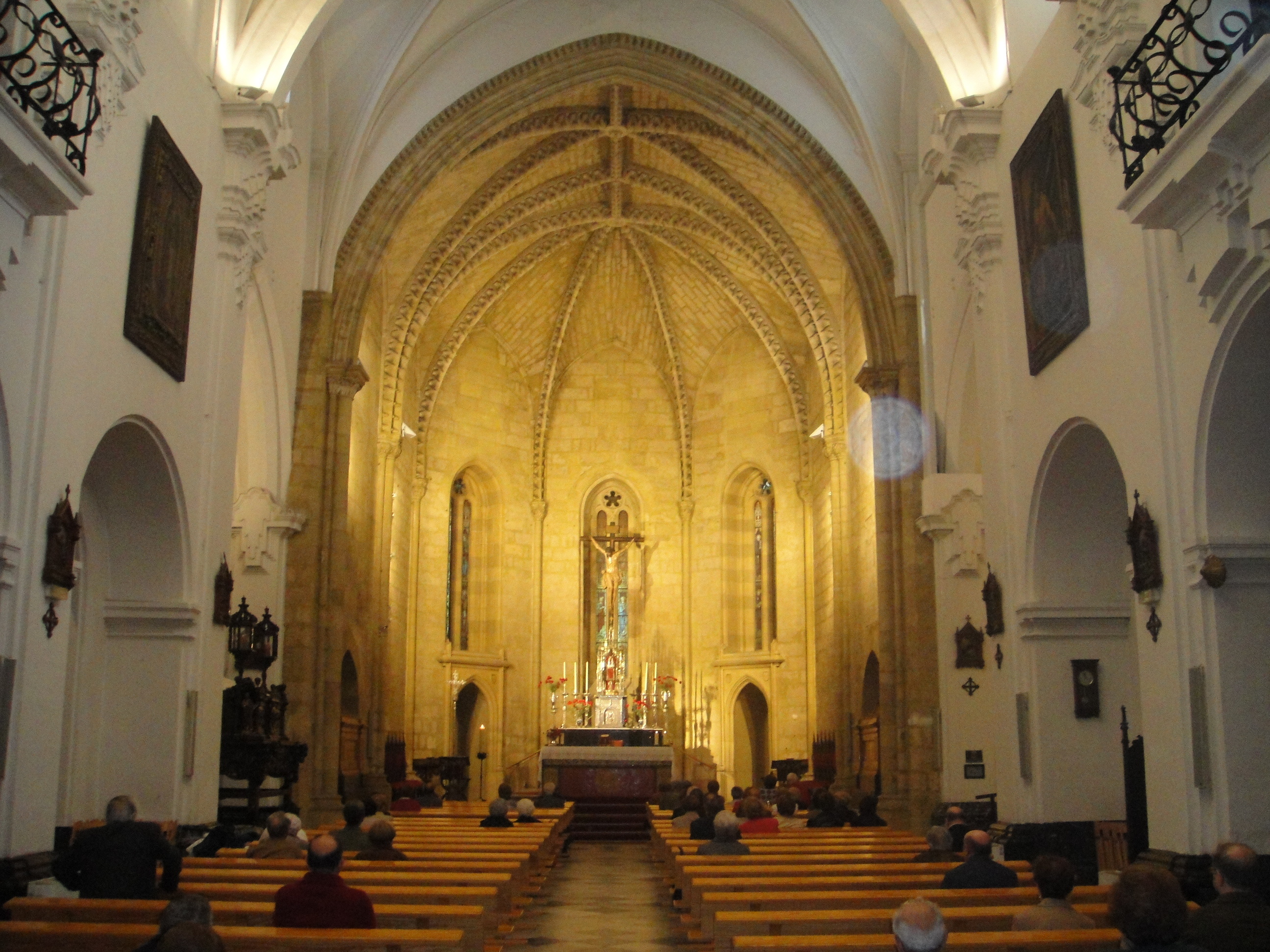 Interior de la iglesia de San Hipólito de Córdoba, provincia de Córdoba, (España).